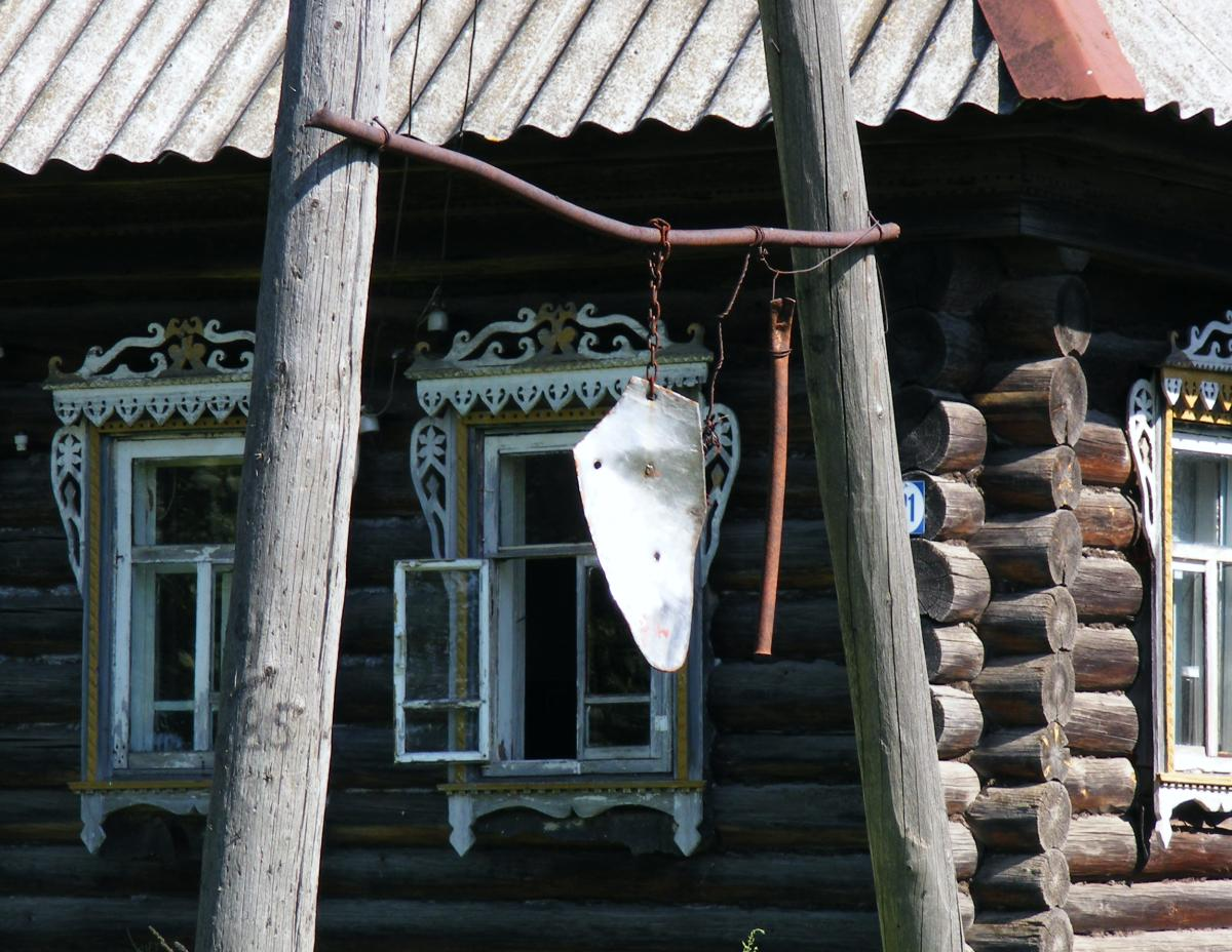 Било на столбе в селе Довлетяково Нижегородской области.